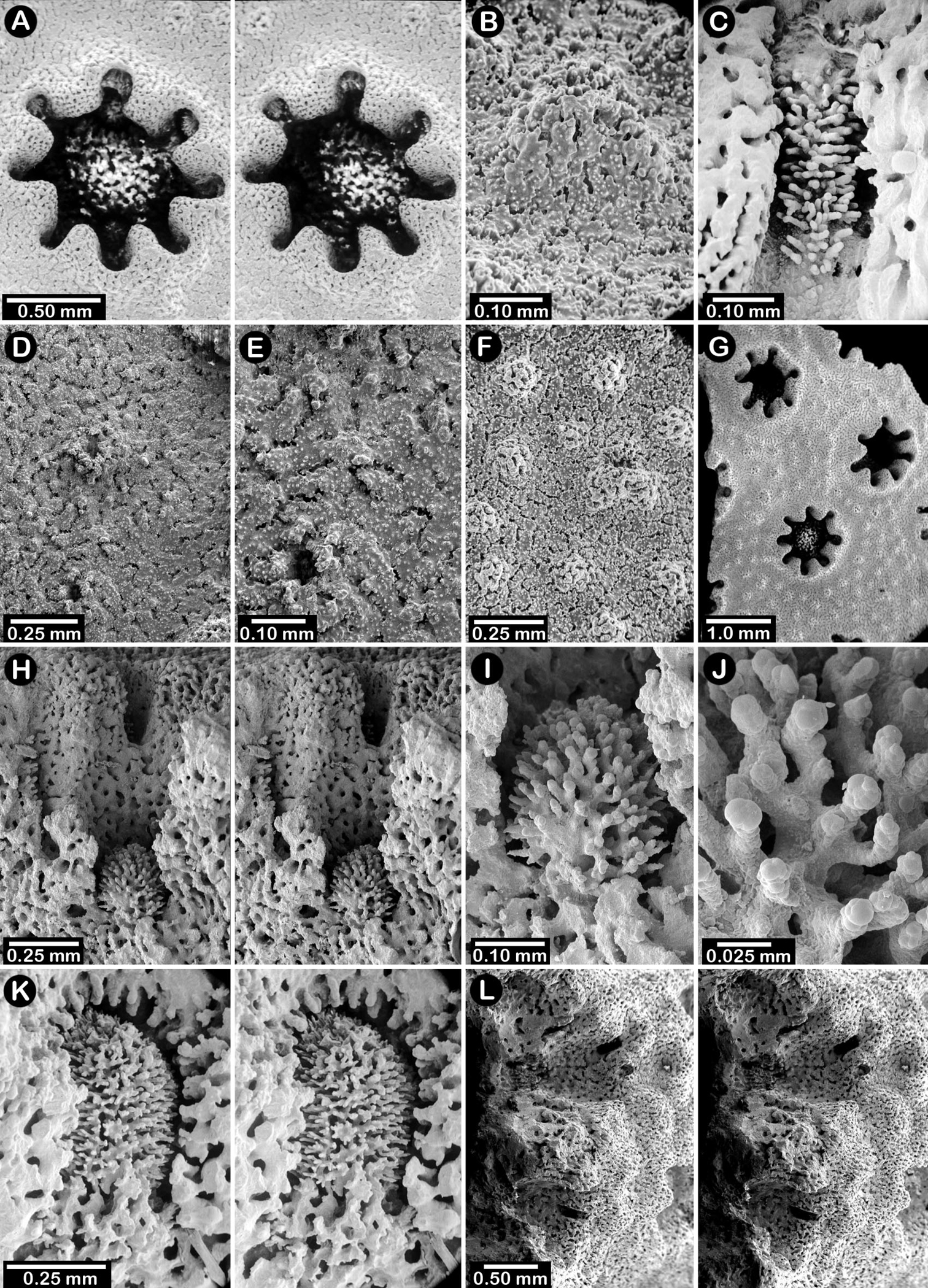 Stylantheca papillosa. A: vista de un ciclosistema, B, D, F: papilas de coenosteum (nematoporos), C: dactiloporo E: dactiloporos G: tres ciclosistemas y muchas papillae H: sección longitudinal de un ciclosistema, I: gastroporo, J: columnas de gastroporo, K: vista de gastroporo y anillo de empalizada, L: vista de sección longitudinal de dos ciclosistemas y una ampulla hembra. Cairns S, Lindner A (2011) A Revision of the Stylasteridae (Cnidaria, Hydrozoa, Filifera) from Alaska and Adjacent Waters. ZooKeys 158: 1-88.